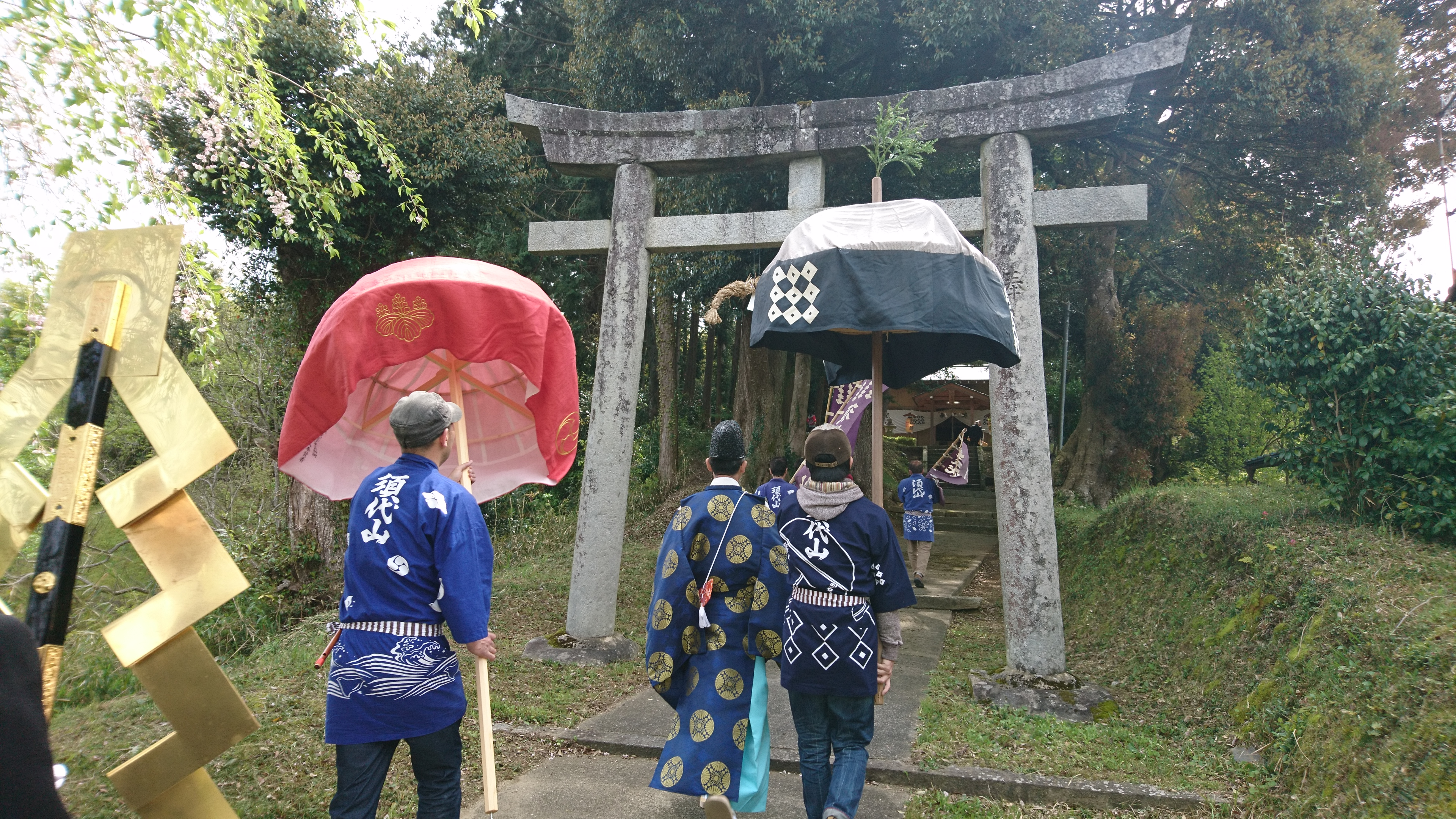 与謝野町 明石 日吉神社 加悦谷祭り